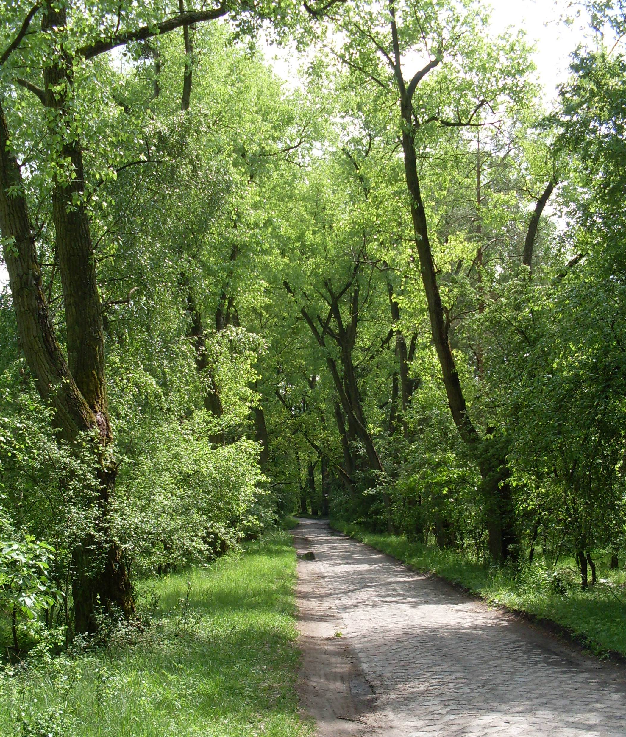 Droga Leśno Górne - Szczecin (Warszewo) o nawierzchni kostkowej, Puszcza Wkrzańska